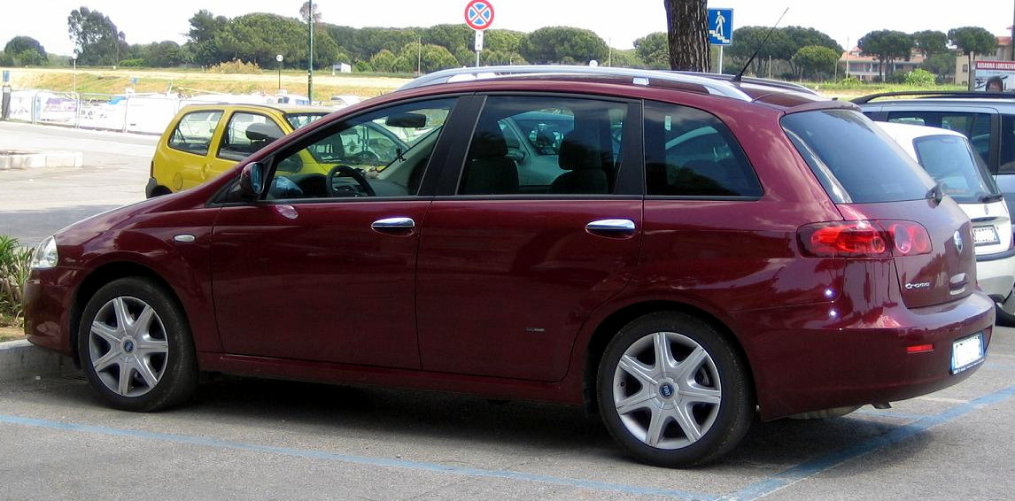 Photo prise avec mon Ixus 40 en mai